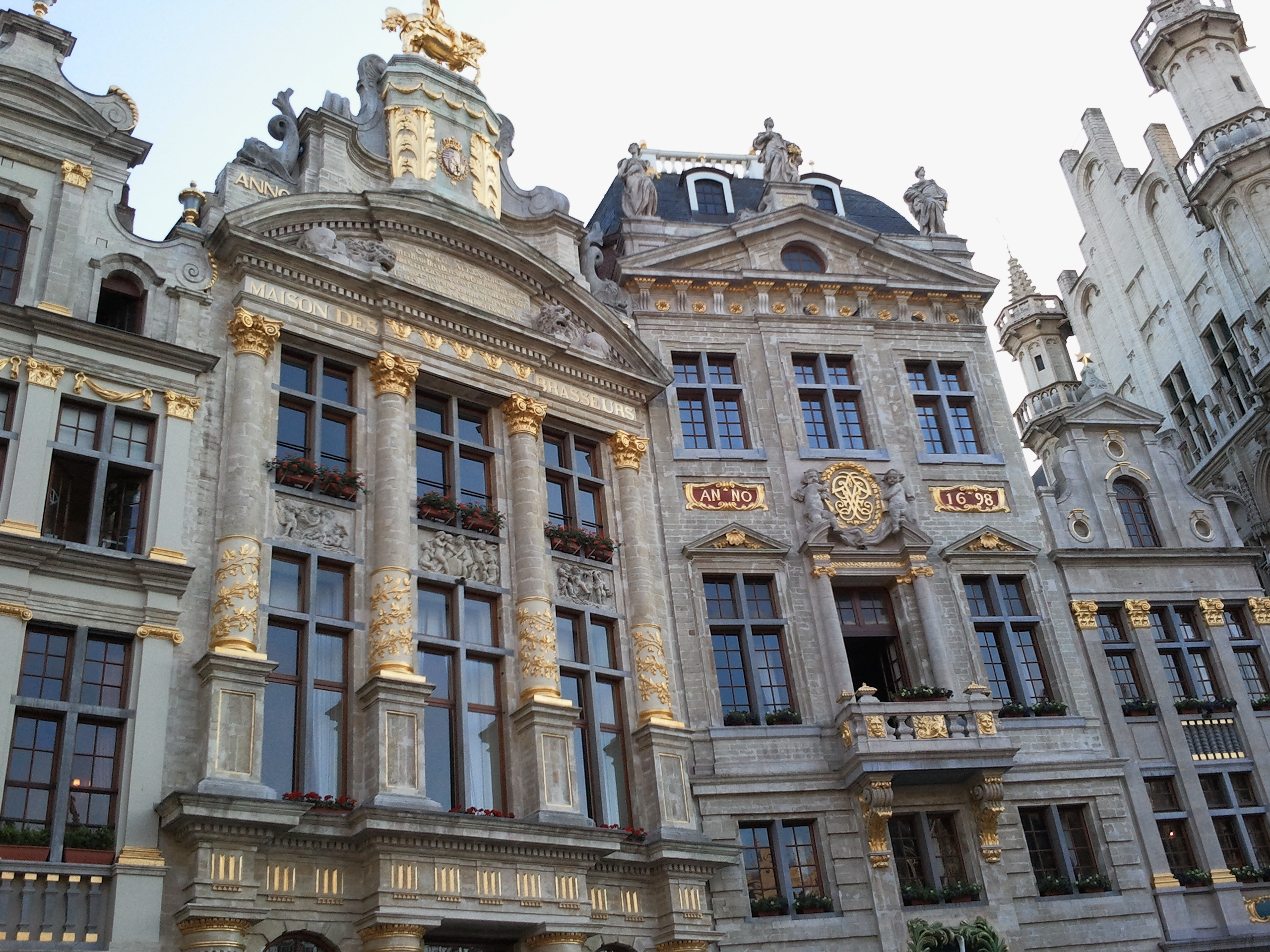 Stupendo edificio nel centro di Bruxelles.Unknown wonderful building in the center of brussels.